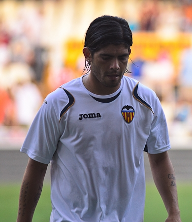 El jugador merengot Ever Banega